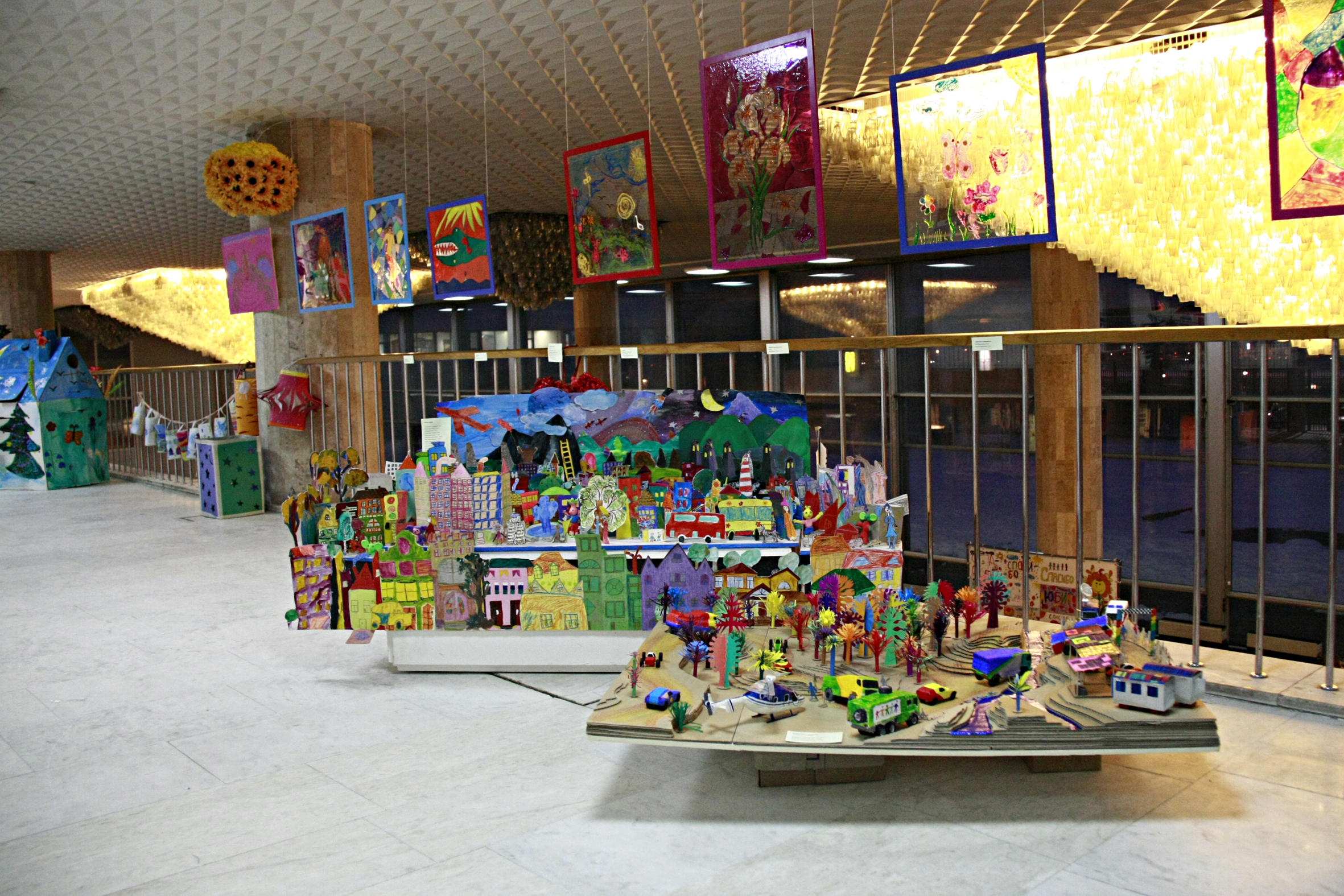 выставка ПЖ